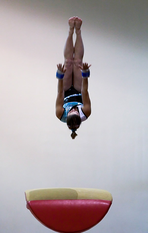 Vault figure.